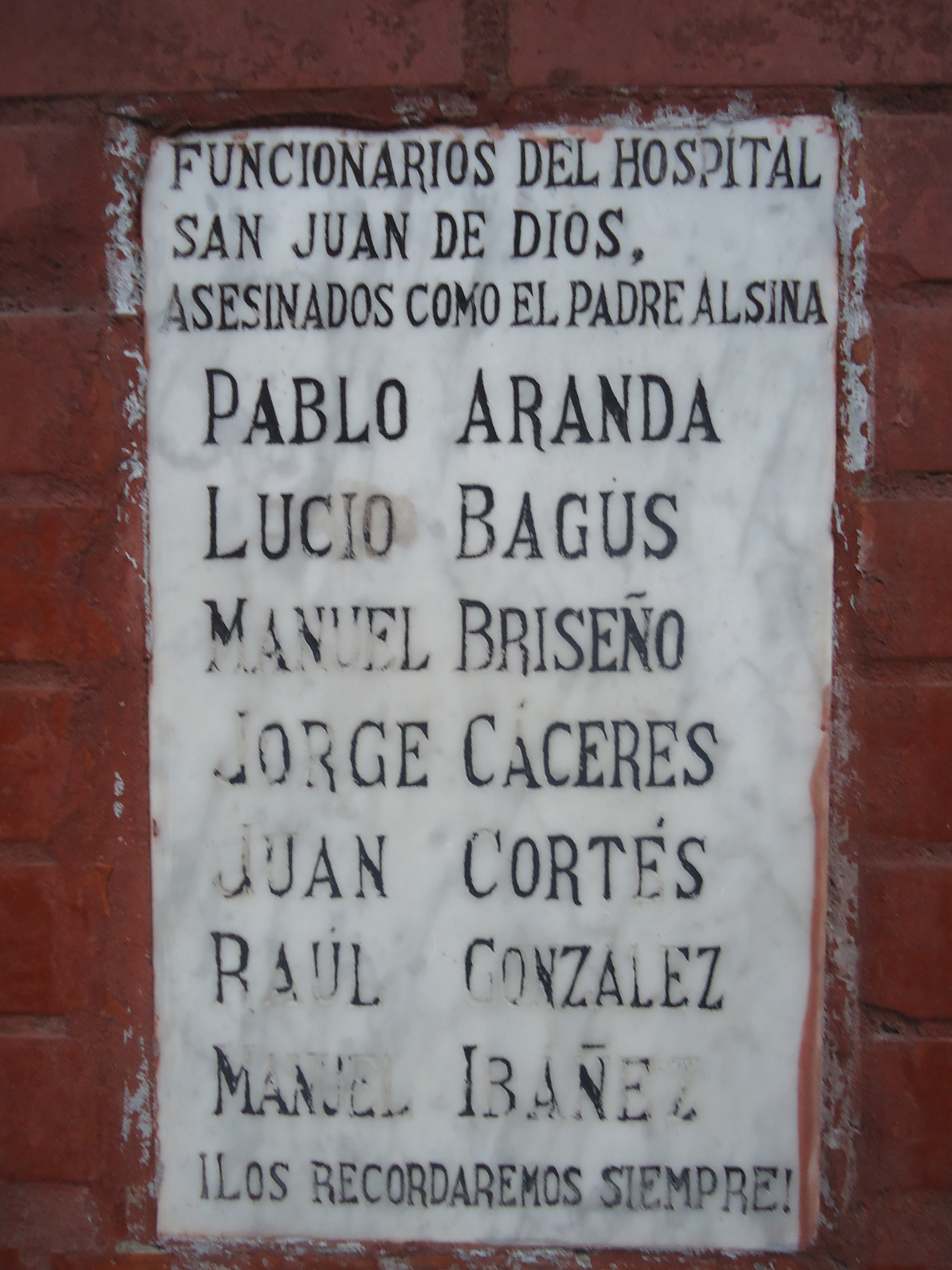 Ejecutados politicos